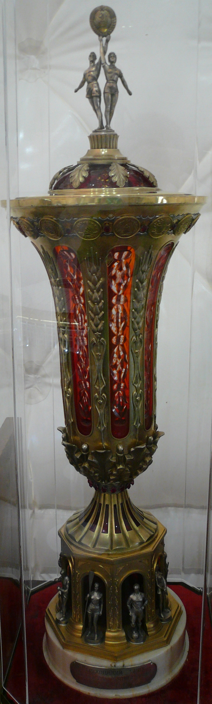 Переходящий приз Совета министров СССР за I место на IV летней Спартакиаде народов СССР. Музей стадиона "Лужники"